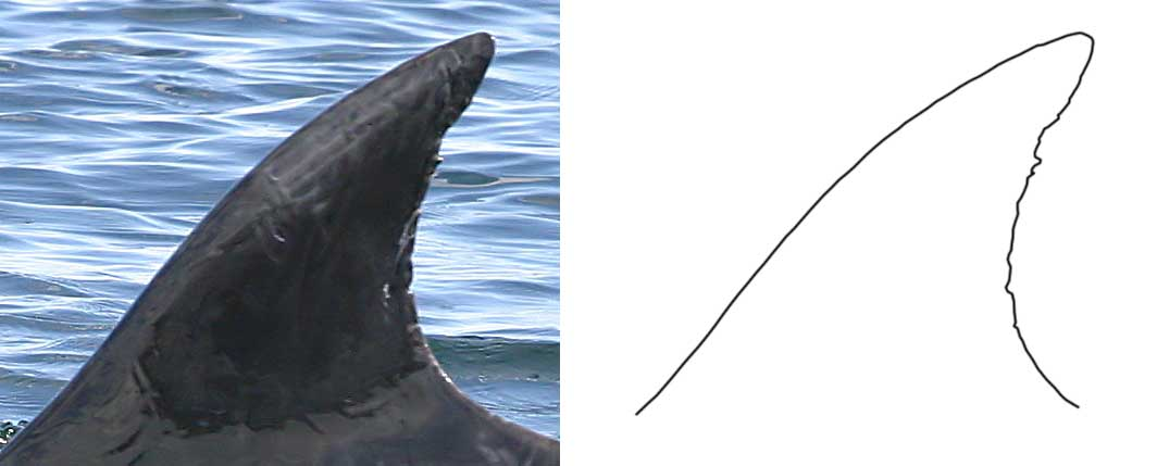 Fra Bruger:Renes brugerside Seperat artikel om foto-id - eller bare under delfiner